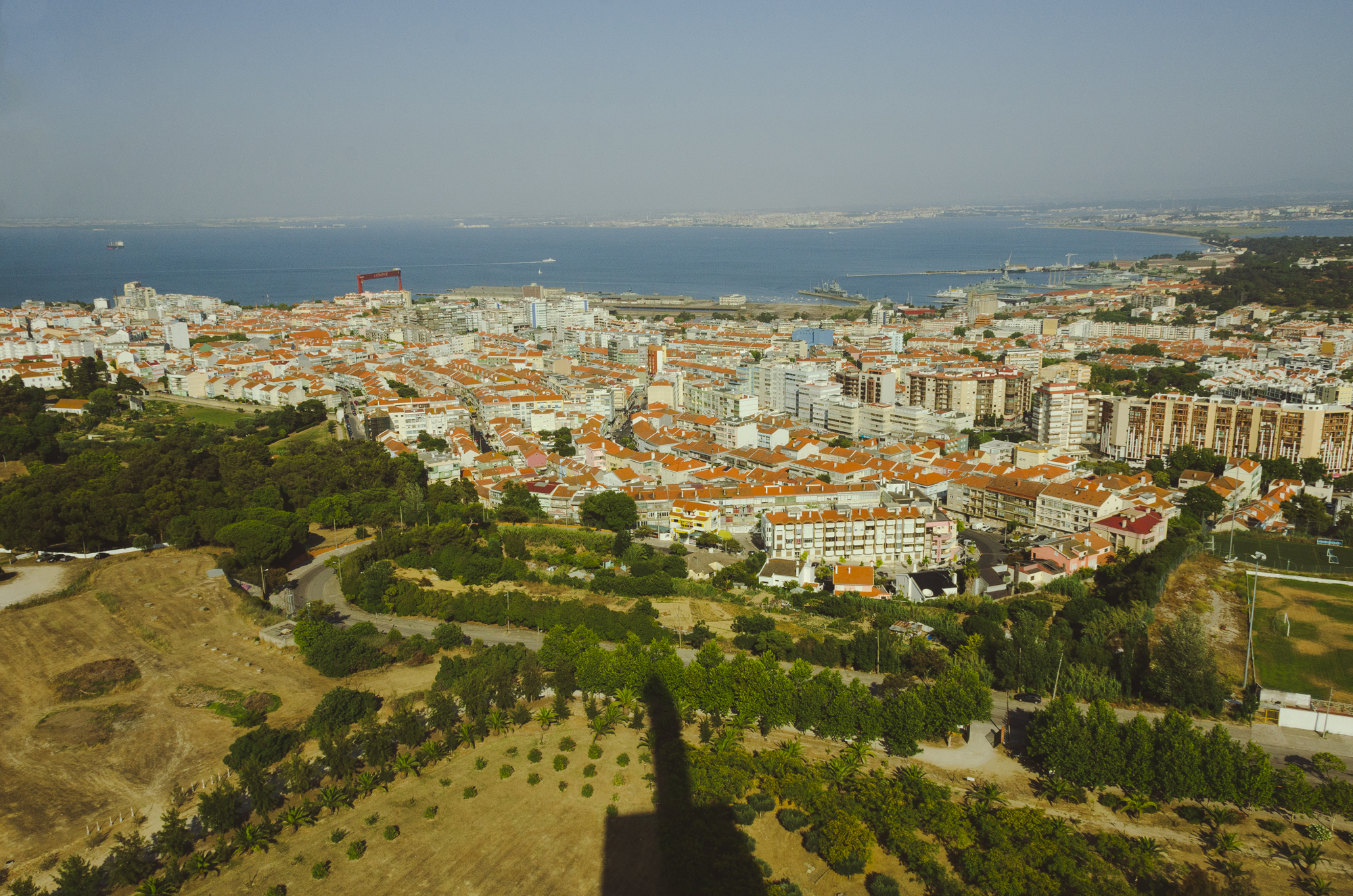 __DSC8247